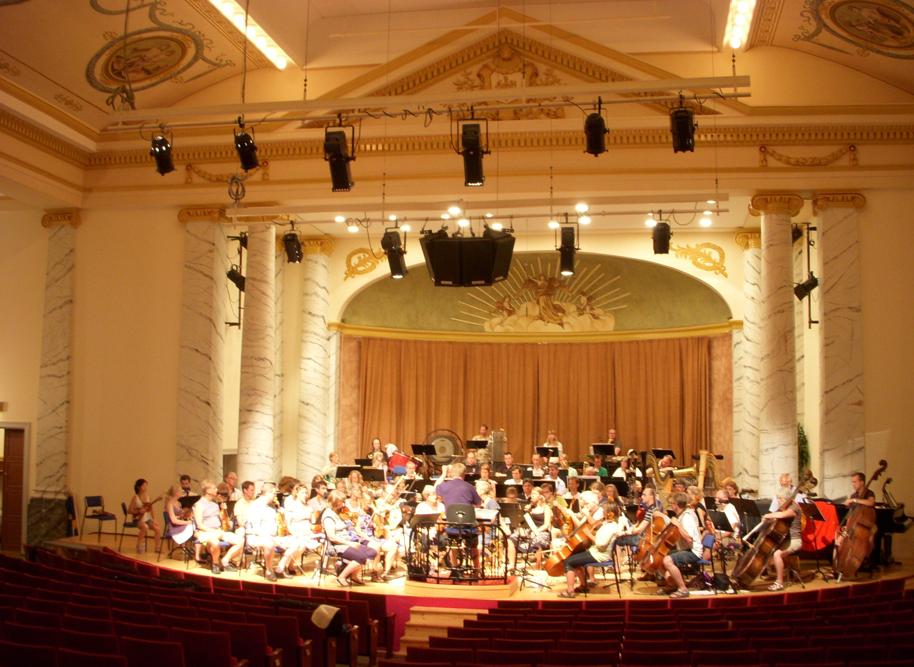 Cassels donation i Grängesberg, interiör